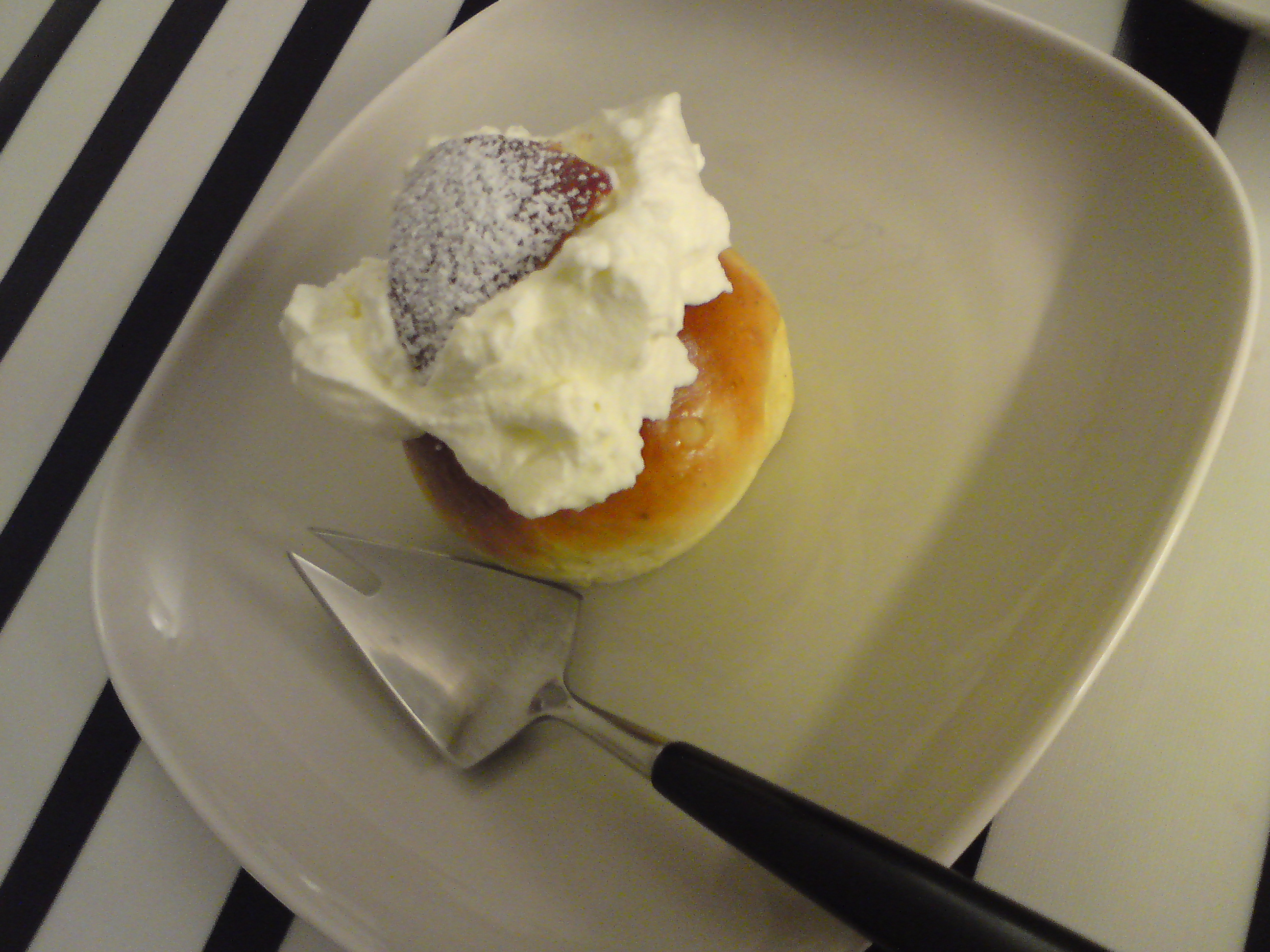 Hemmagjord semla